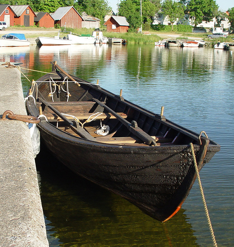 Gotland: Fischerboot in Katthammarsvik. Laut Besitzer auf Gotland gebaut und originalgetreu restauriert